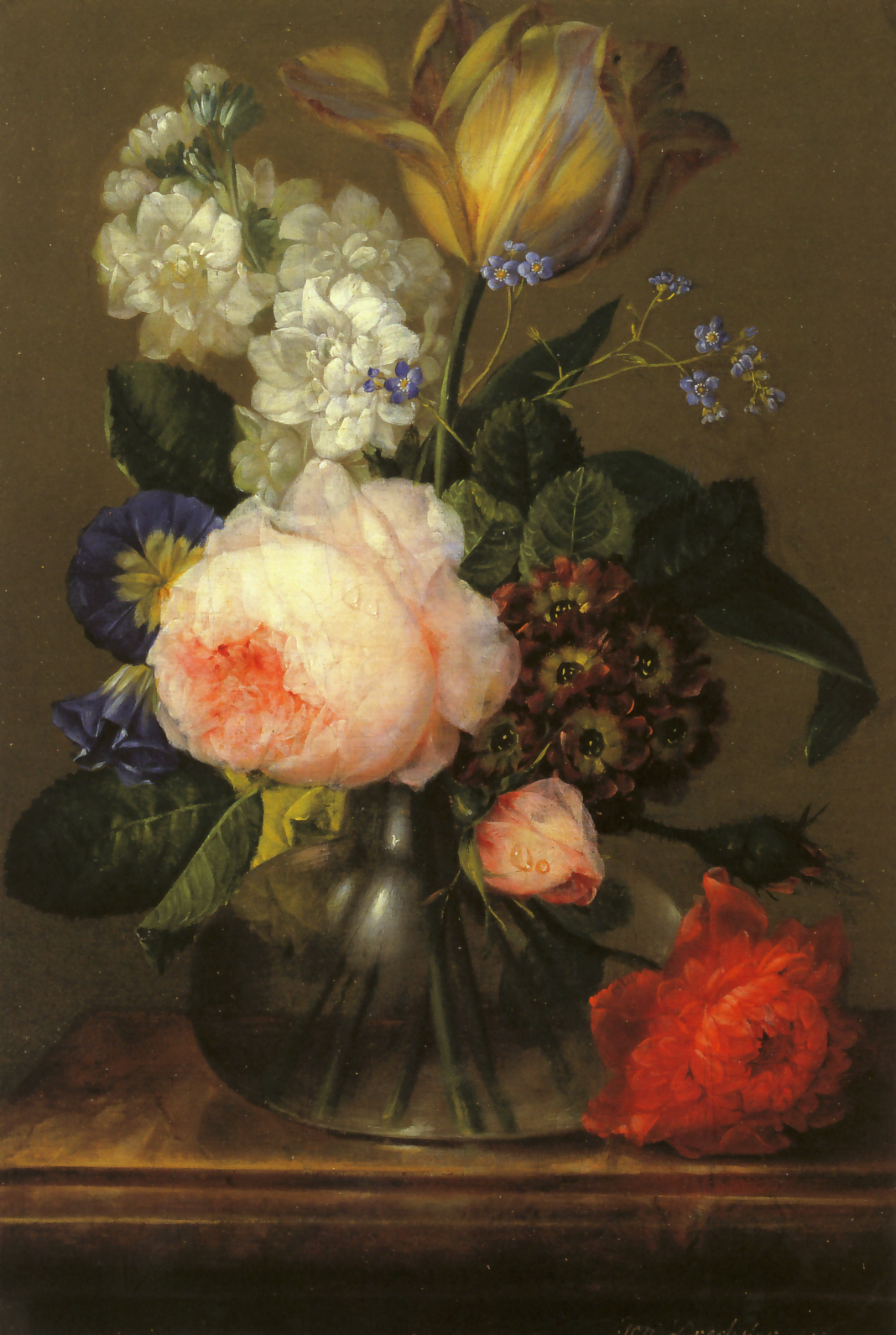 Kleines Blumenstilllebentitle QS:P1476,de:"Kleines Blumenstillleben" label QS:Lde,"Kleines Blumenstillleben"